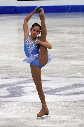 Юлия Липницкая (Россия) на чемпионате мира по фигурному катанию 2012